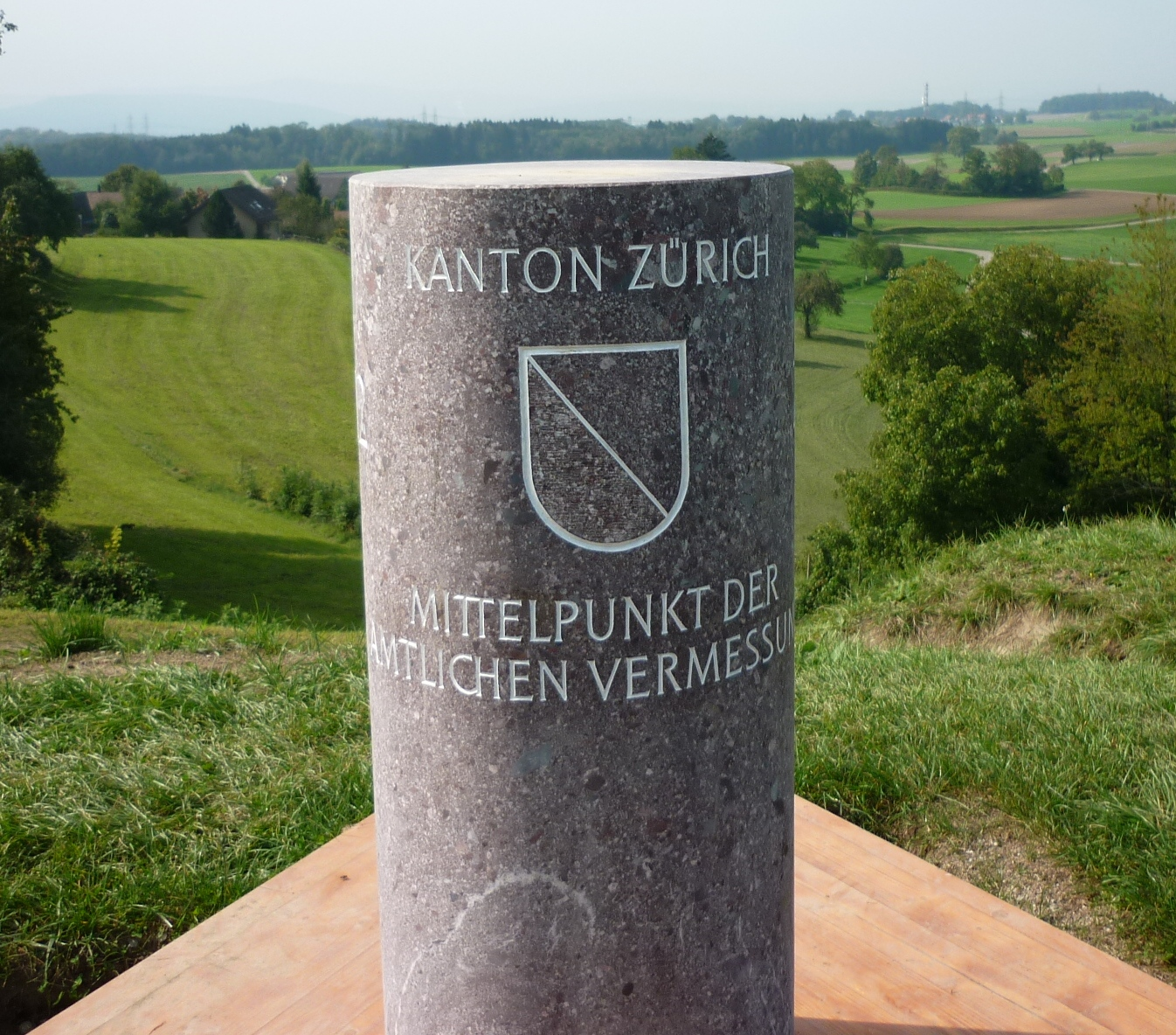 Mittelpunkt Amtliche Vermessung Kanton Zürich, Brütten ZH, Schweiz